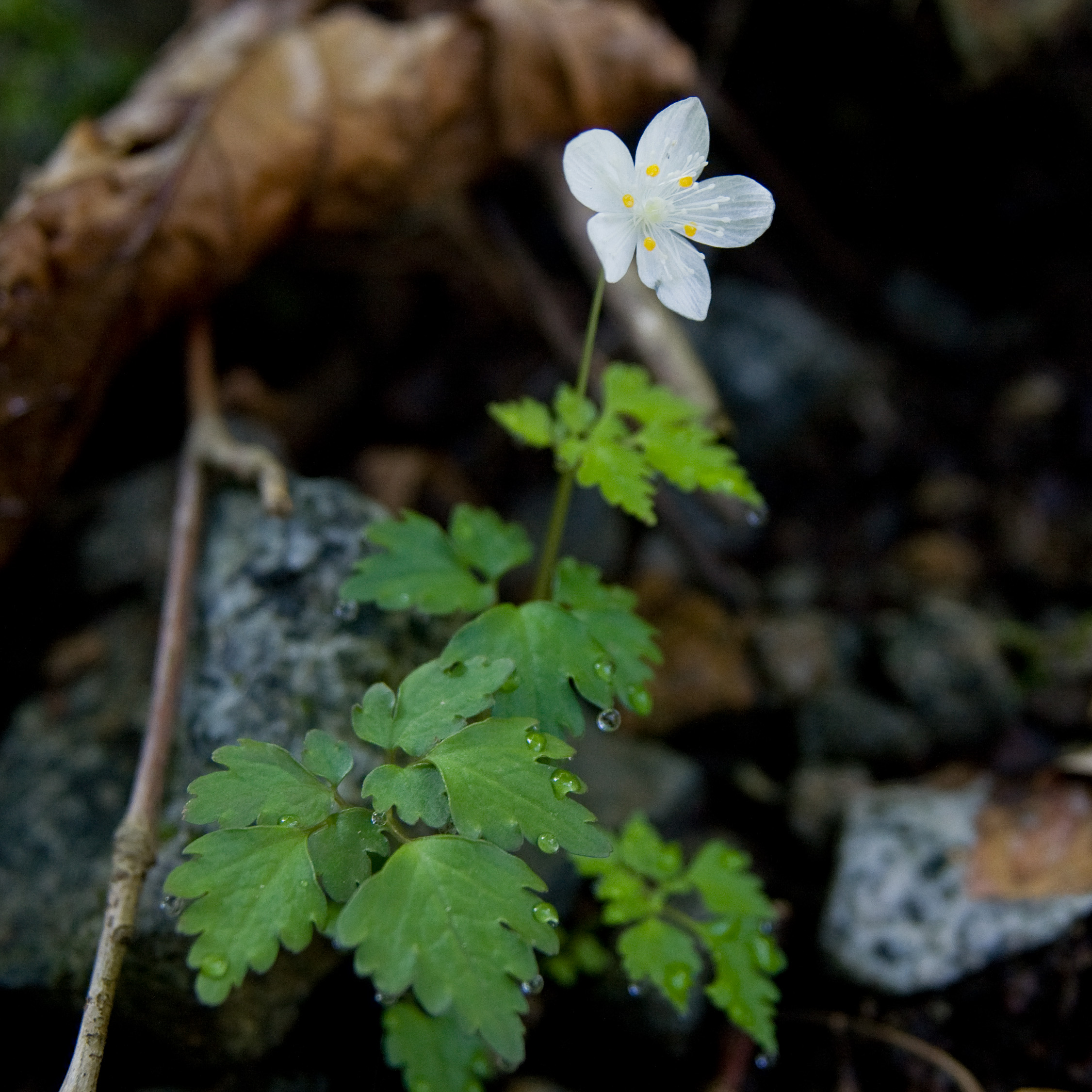 ツルシロカネソウ (学名:Dichocarpum stoloniferum)